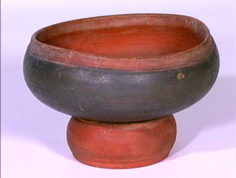 Dobbeltbolle for øl fra Røros, Sør-Trøndelag. Diam. 16,5 cm. Norsk Folkemuseum NF.1919-0259